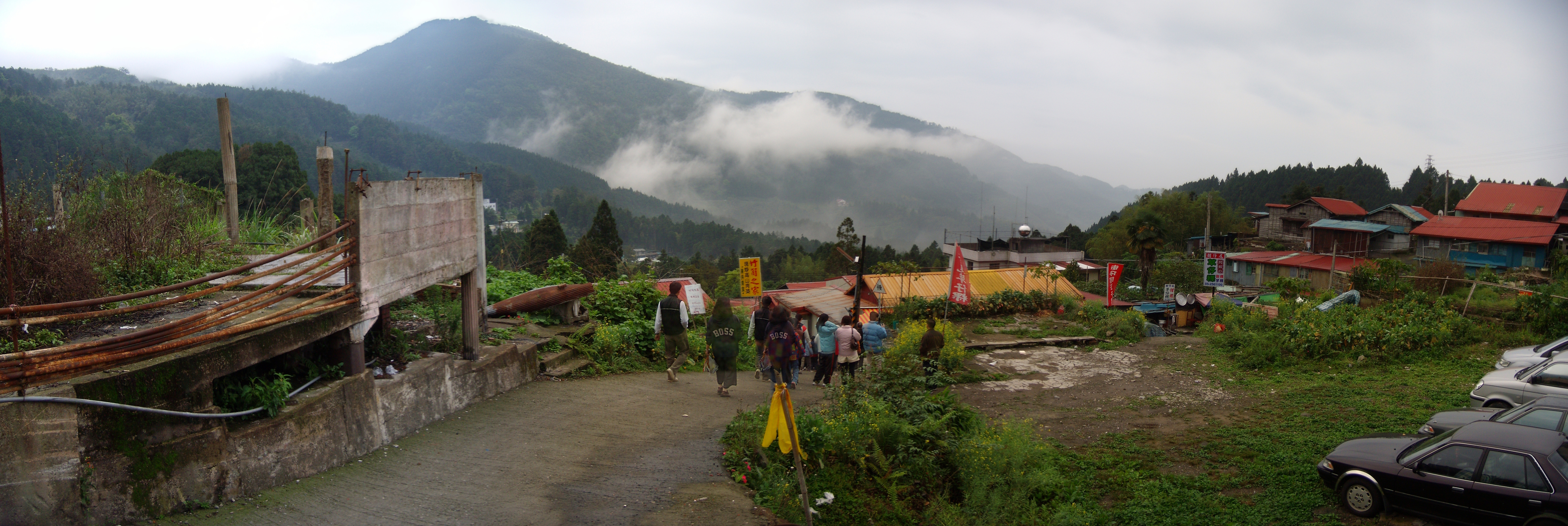 中文（台灣）: 臺灣奮起湖的霧景